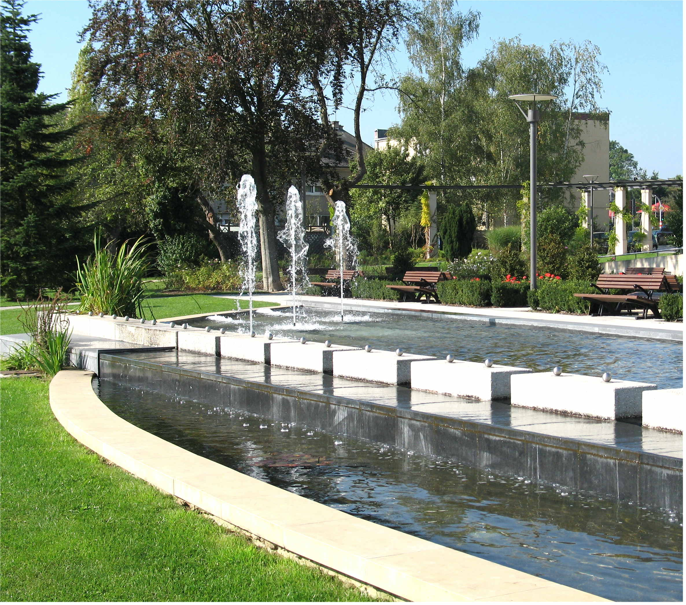 Am Park beim Centre Barblé zu Stroossen